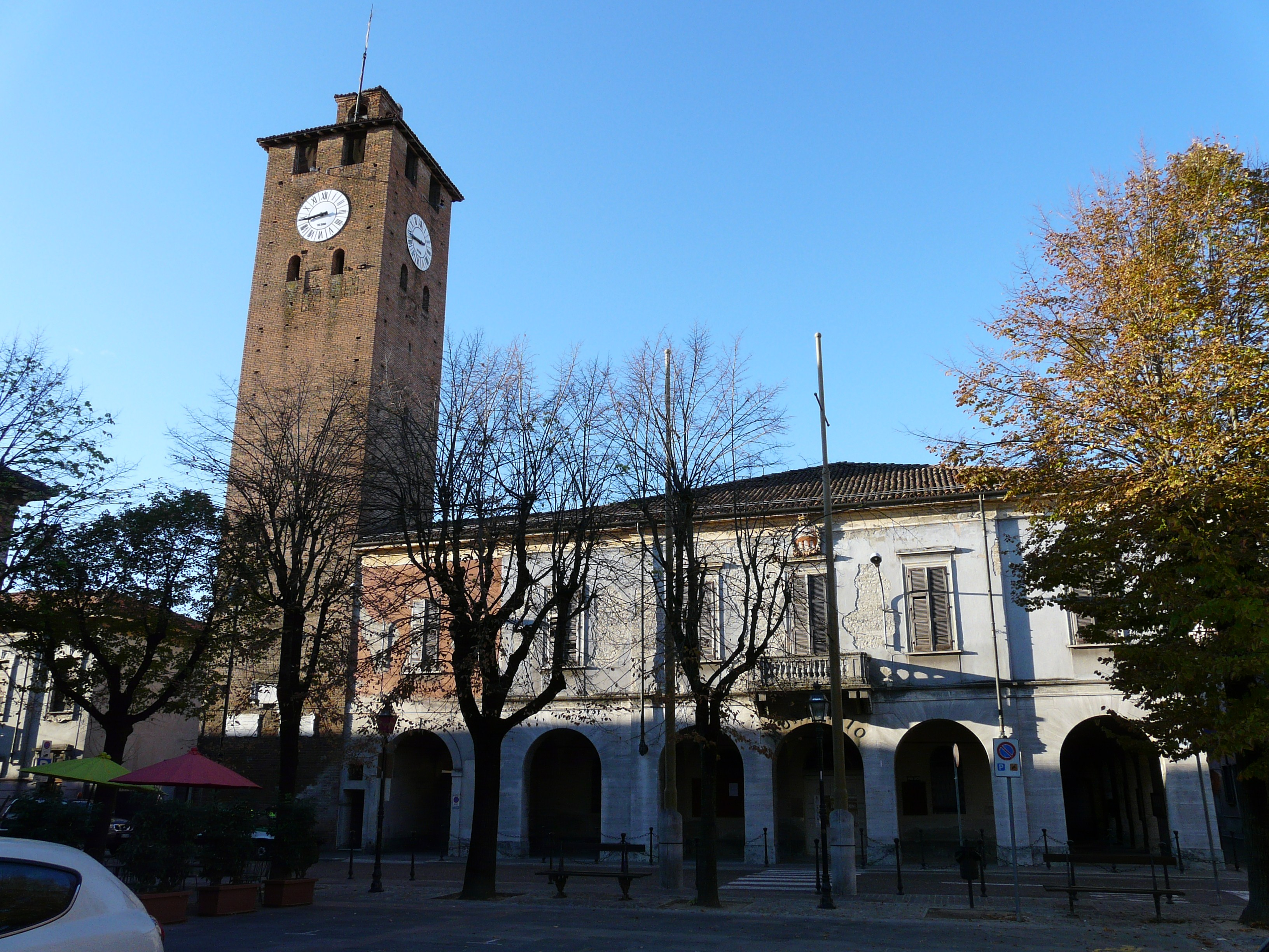 Torre civica e vecchio municipio di Pontecurone, Piemonte, Italy